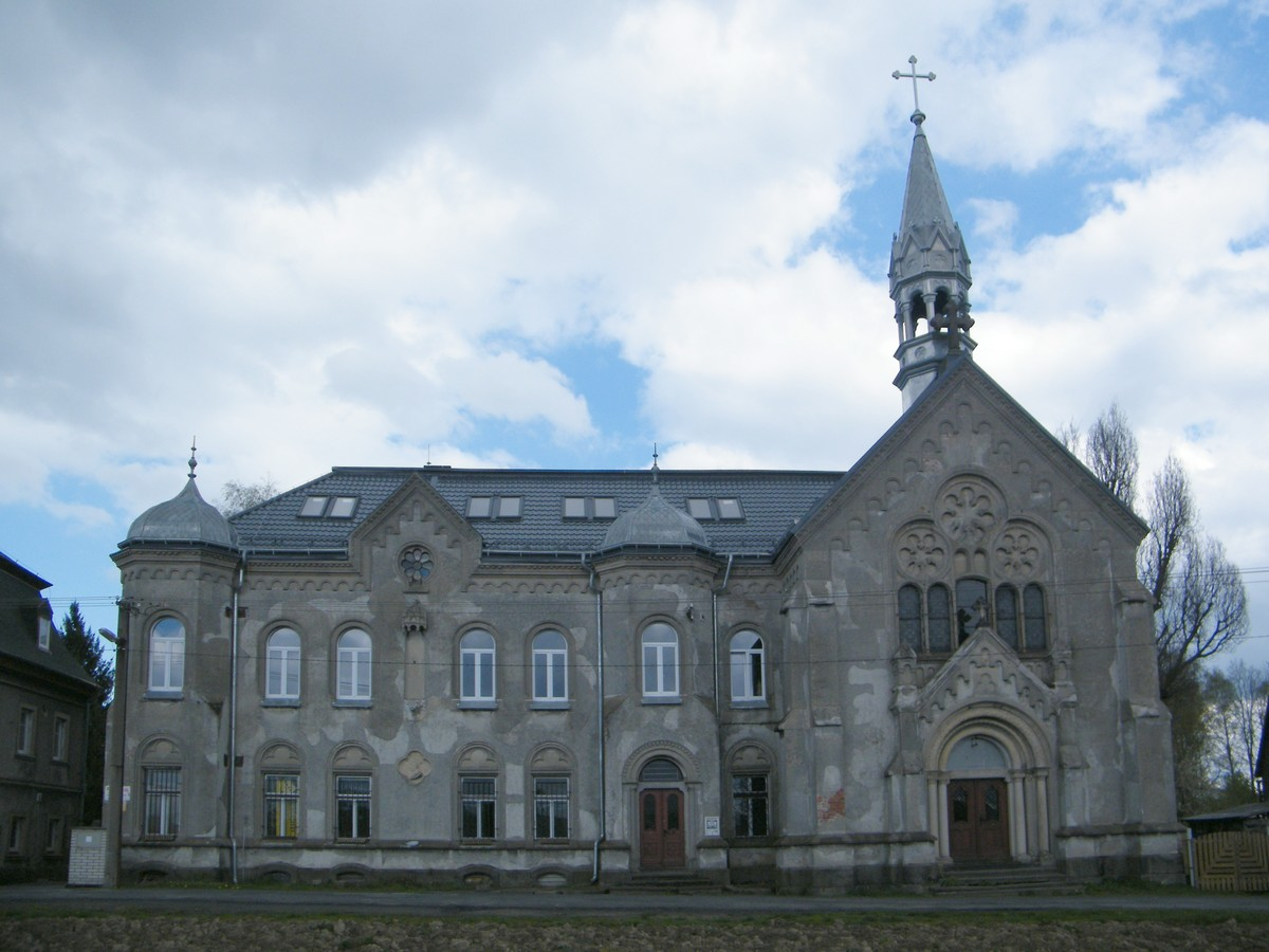 Klášter v Jiříkově